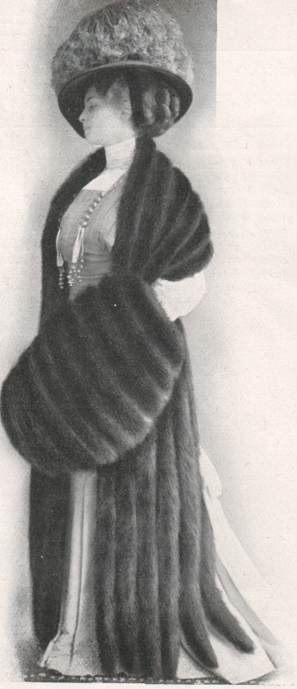 Skunksfell-Muff und -Schal